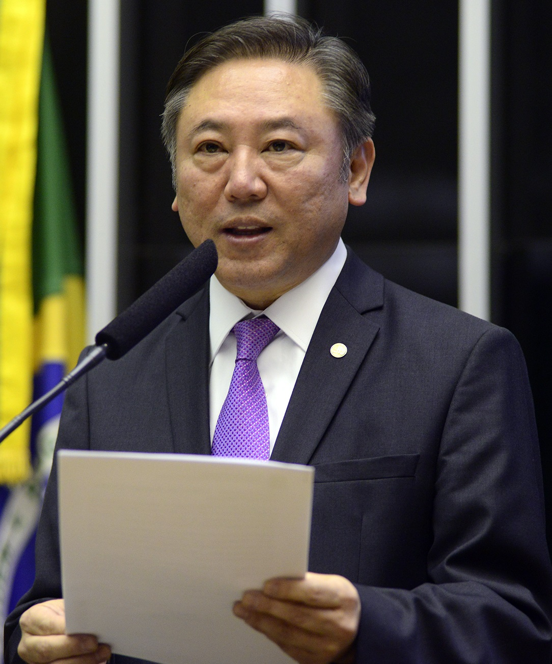 Walter Ihosh em setembro de 2015.